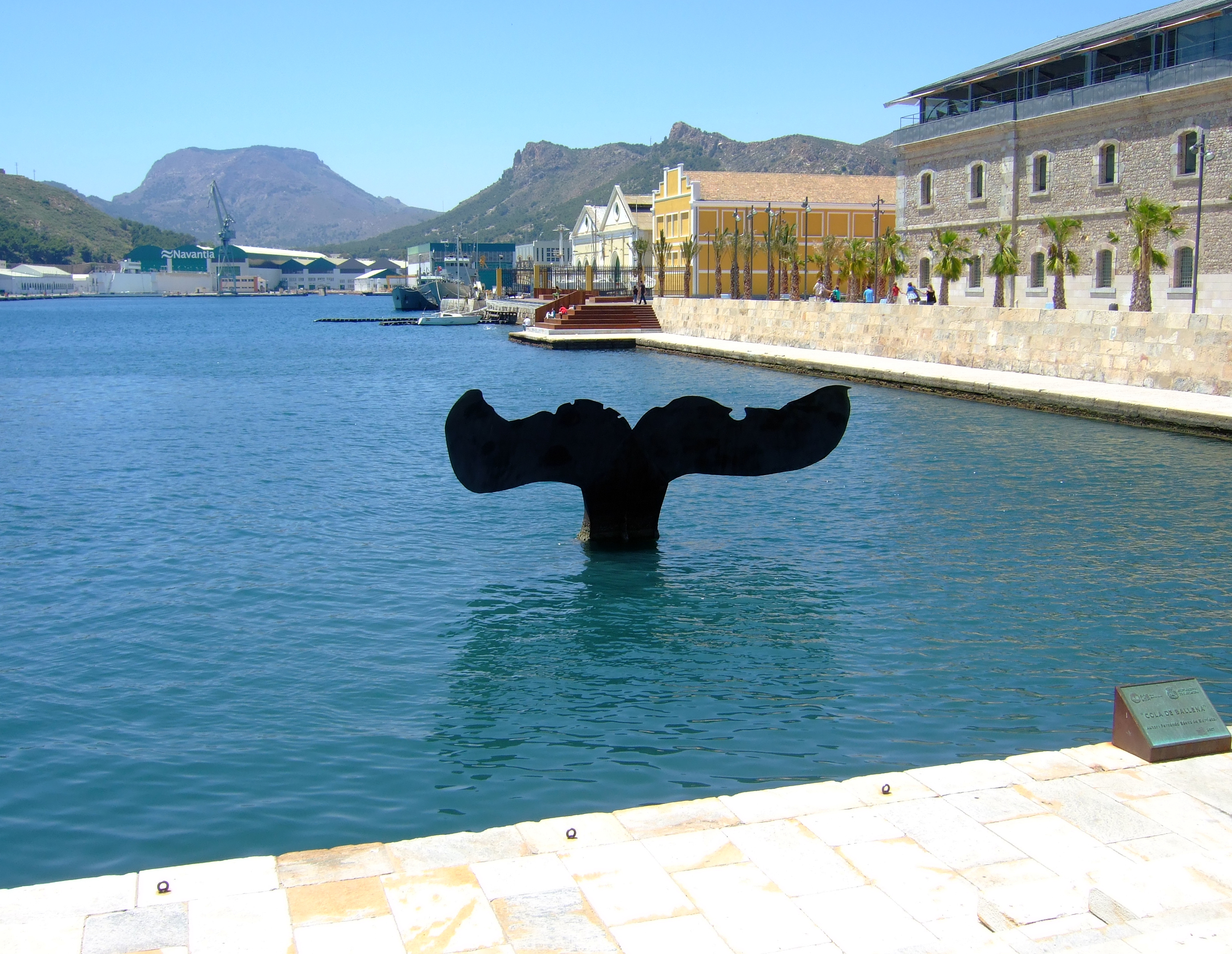 Escultura "Cola de Ballena" en el Puerto de Cartagena - Murcia